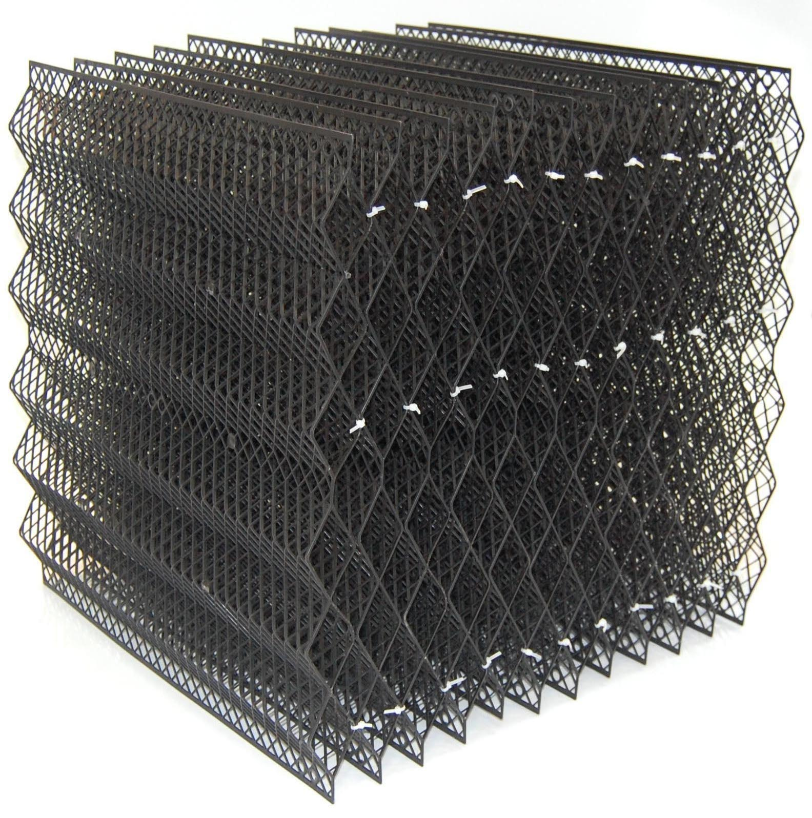 4.Ороситель капельно-плёночный БНС 5.5.5.